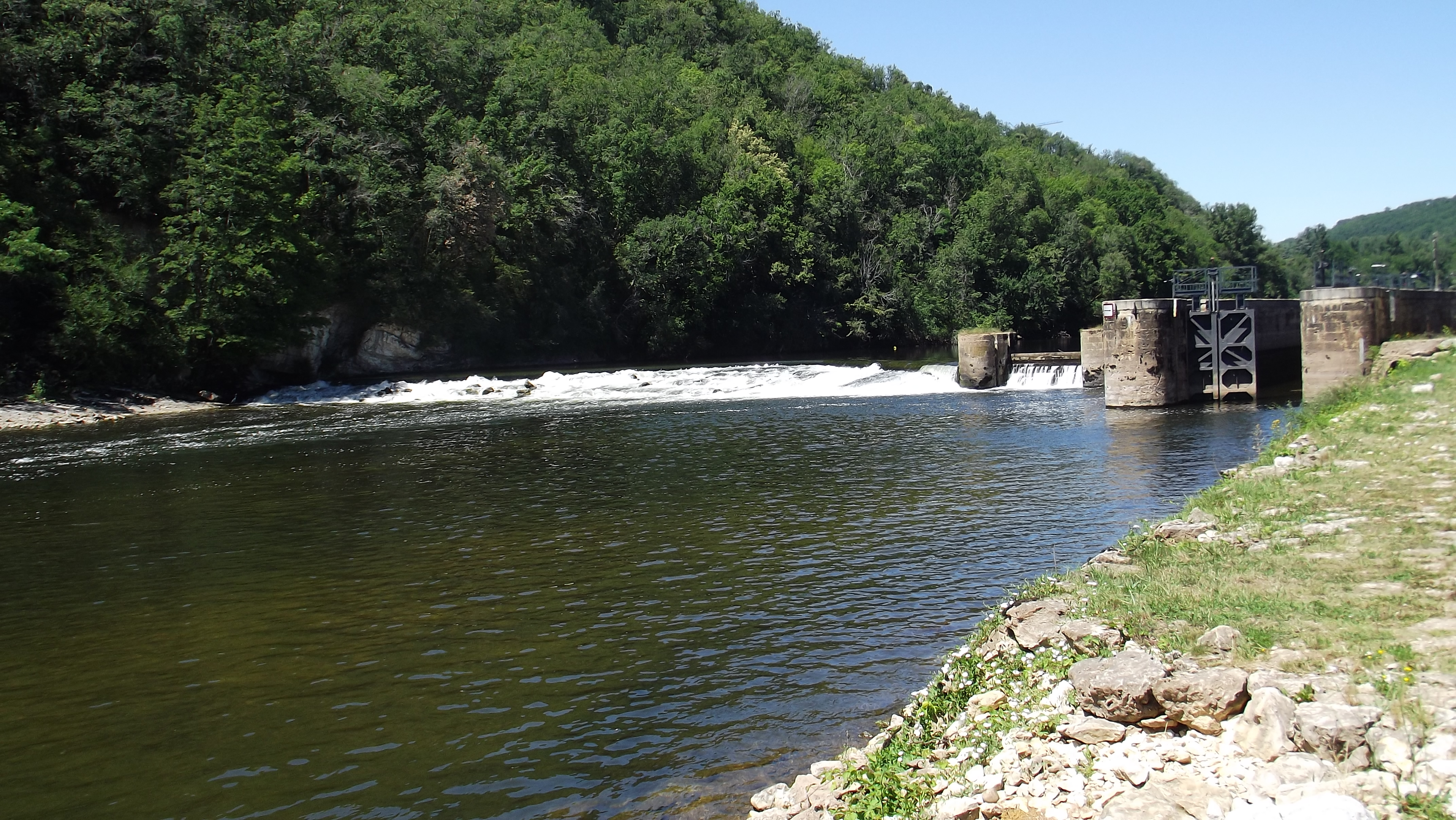 Écluse sur le Lot, Pescadoires 46